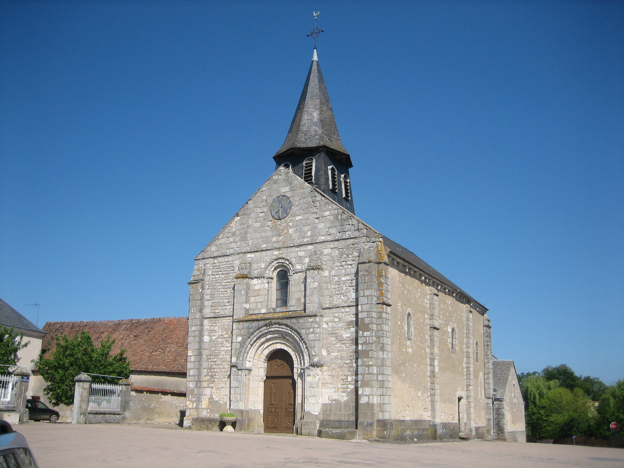 Église Saint-Martin de Vicq-Exemplet